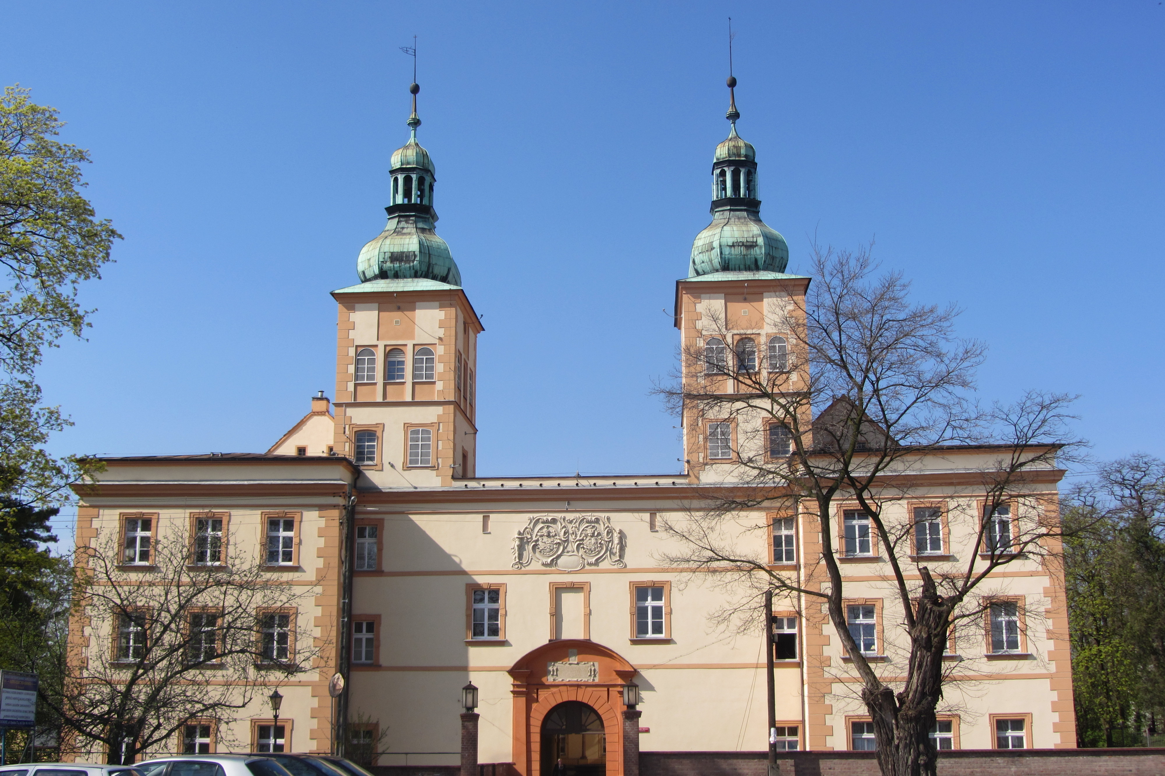 Das Proskauer Schloss